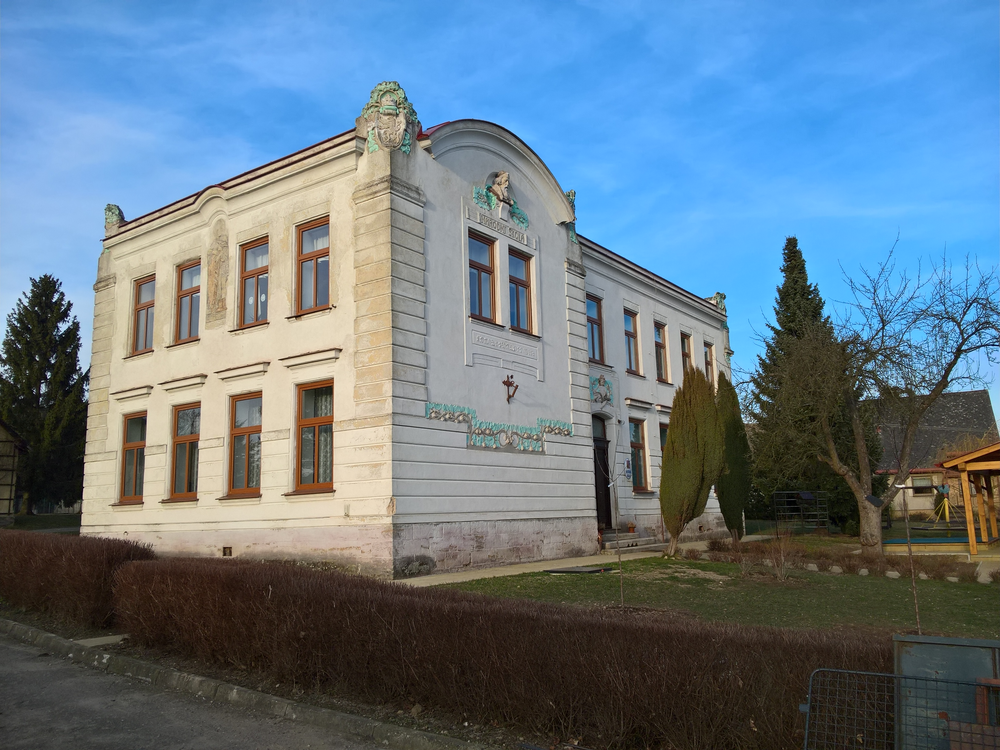 Národní škola v Olešnici